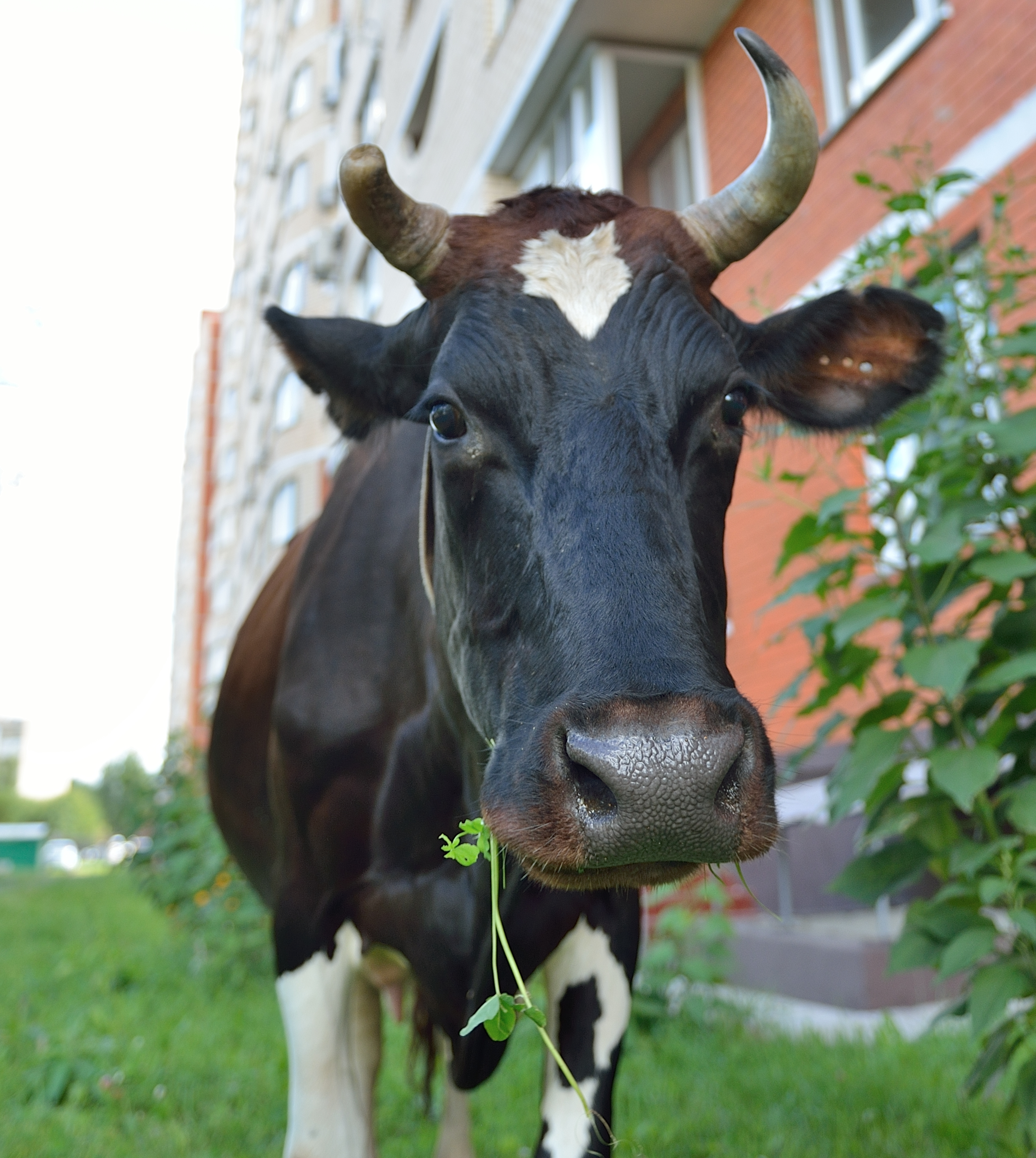 Московские коровы